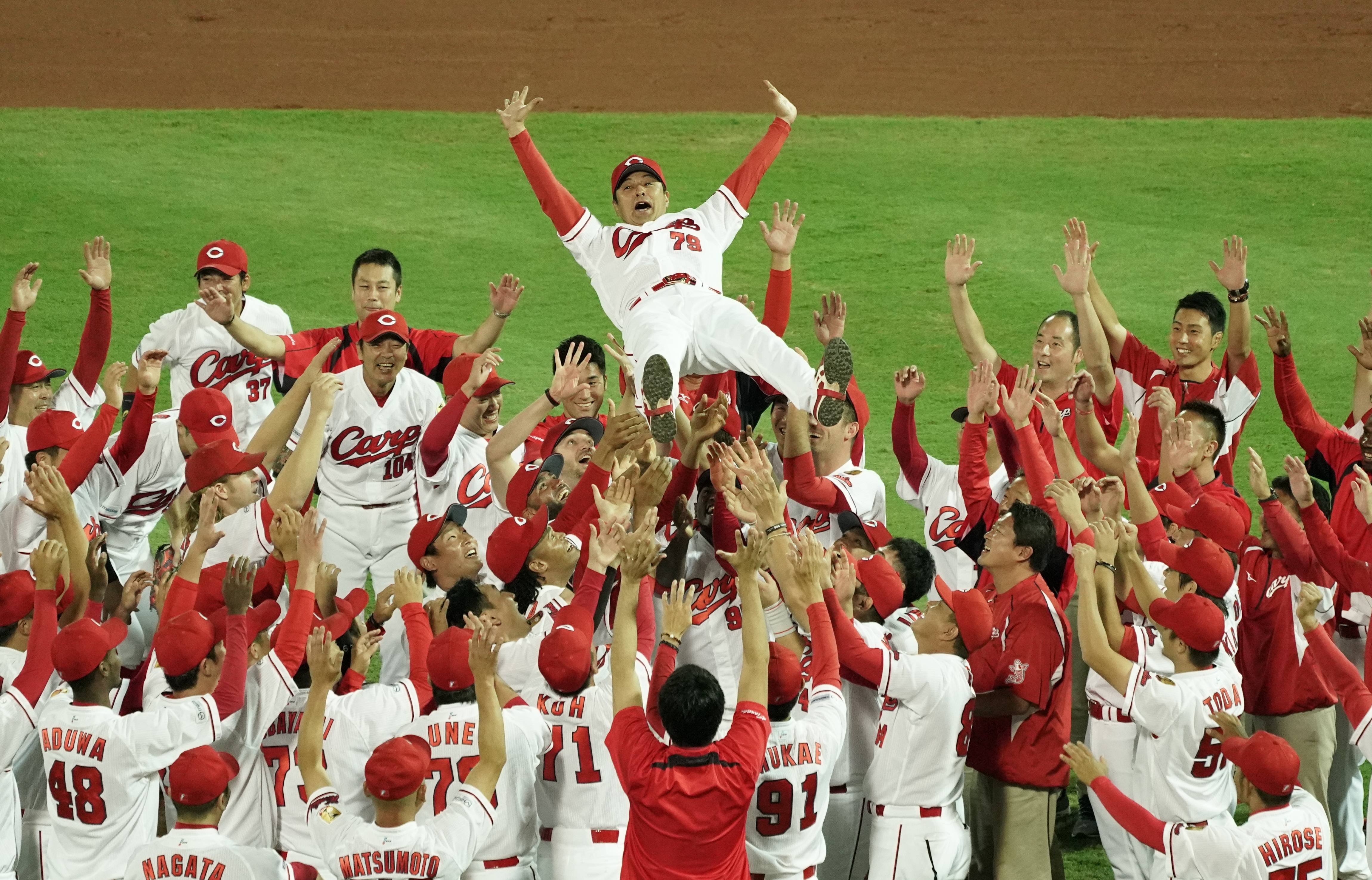 2018年9月26日、マツダ Zoom-Zoom スタジアム広島にて、緒方孝市監督胴上げを撮影